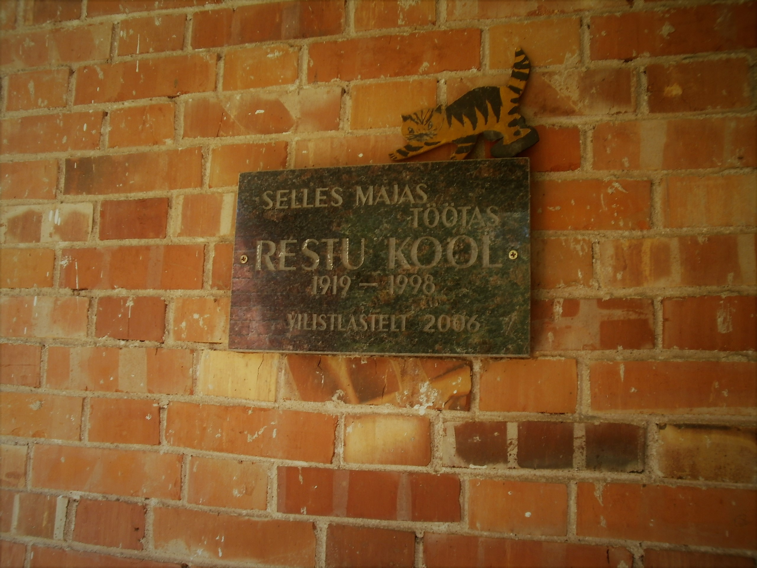 Mälestustahvel kooli vilistlastelt peaukse kõrval.